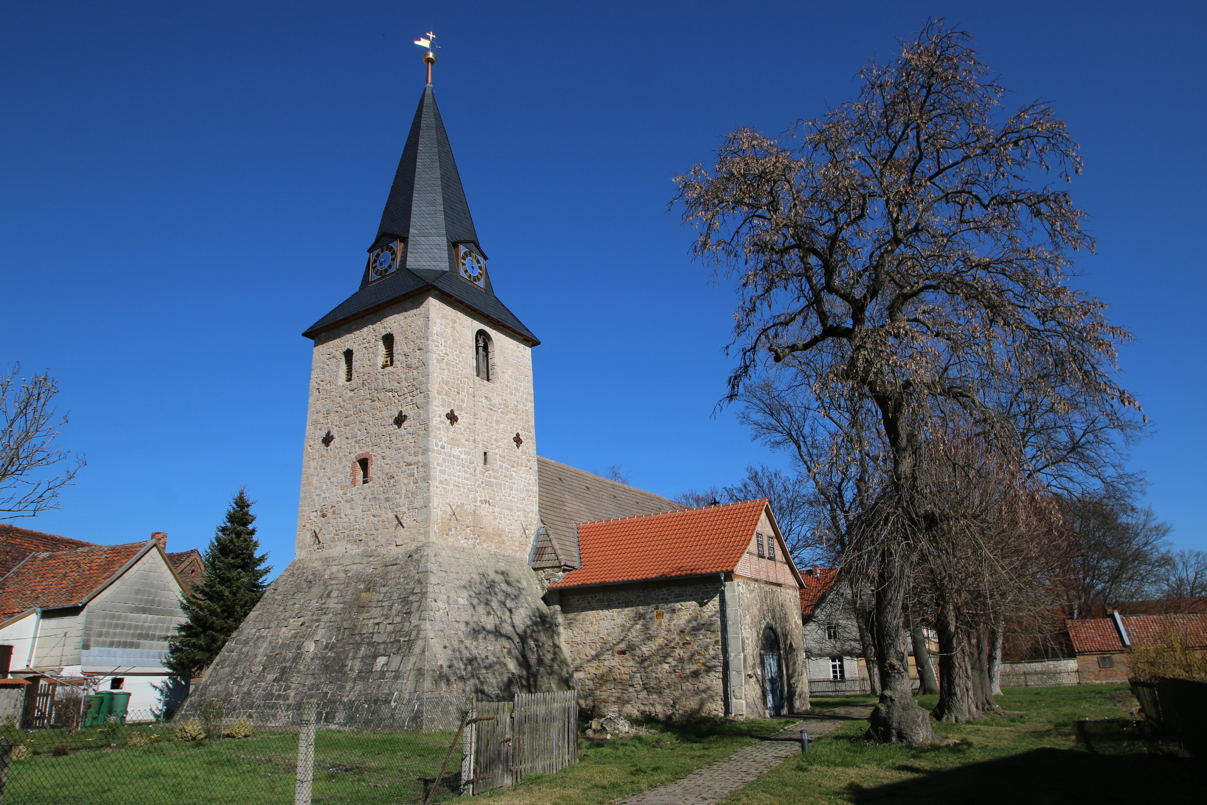 Dorfkirche in Dedeleben / Huy